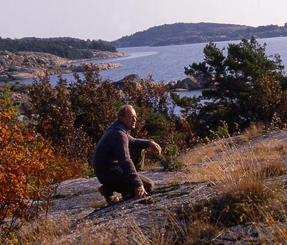 Arne Blomberg sitter vid klipporna